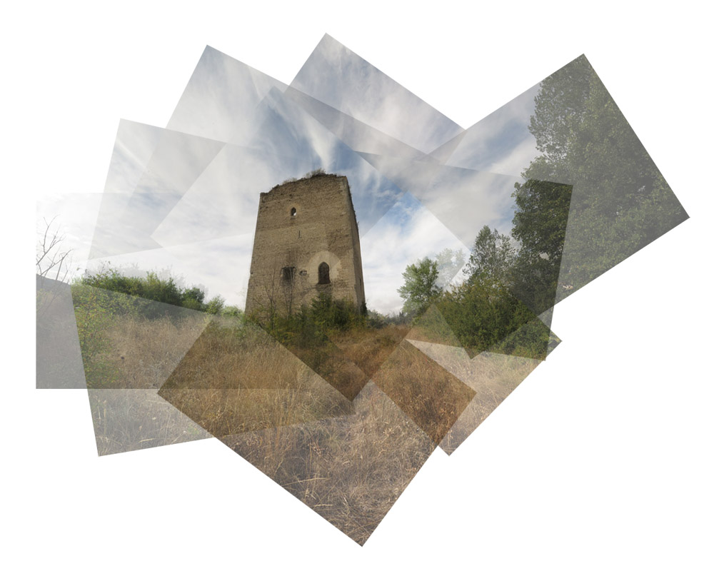 Torreón de los Sánchez de Velasco en la localidad de Berberana (Burgos, España)